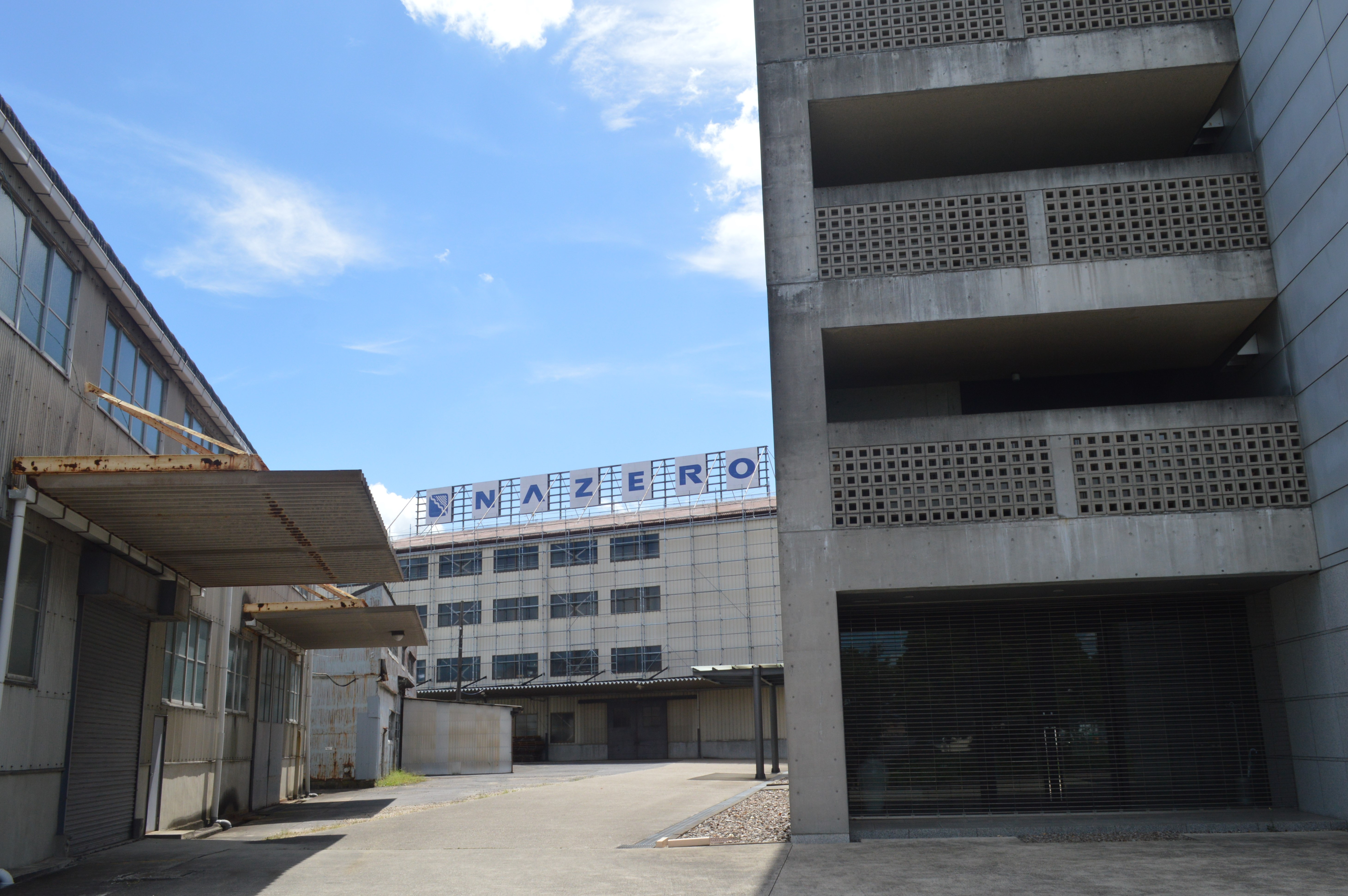 愛知県刈谷市今川町花池53番地にある家具メーカーのナゼロ株式会社。